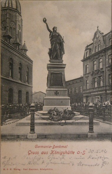 Königshütte: Das Kriegerdenkmal 1870/71 mit dem Kolossal-Standbild der Germania, in Königshütte neben dem Kaiserlichen Postamt.